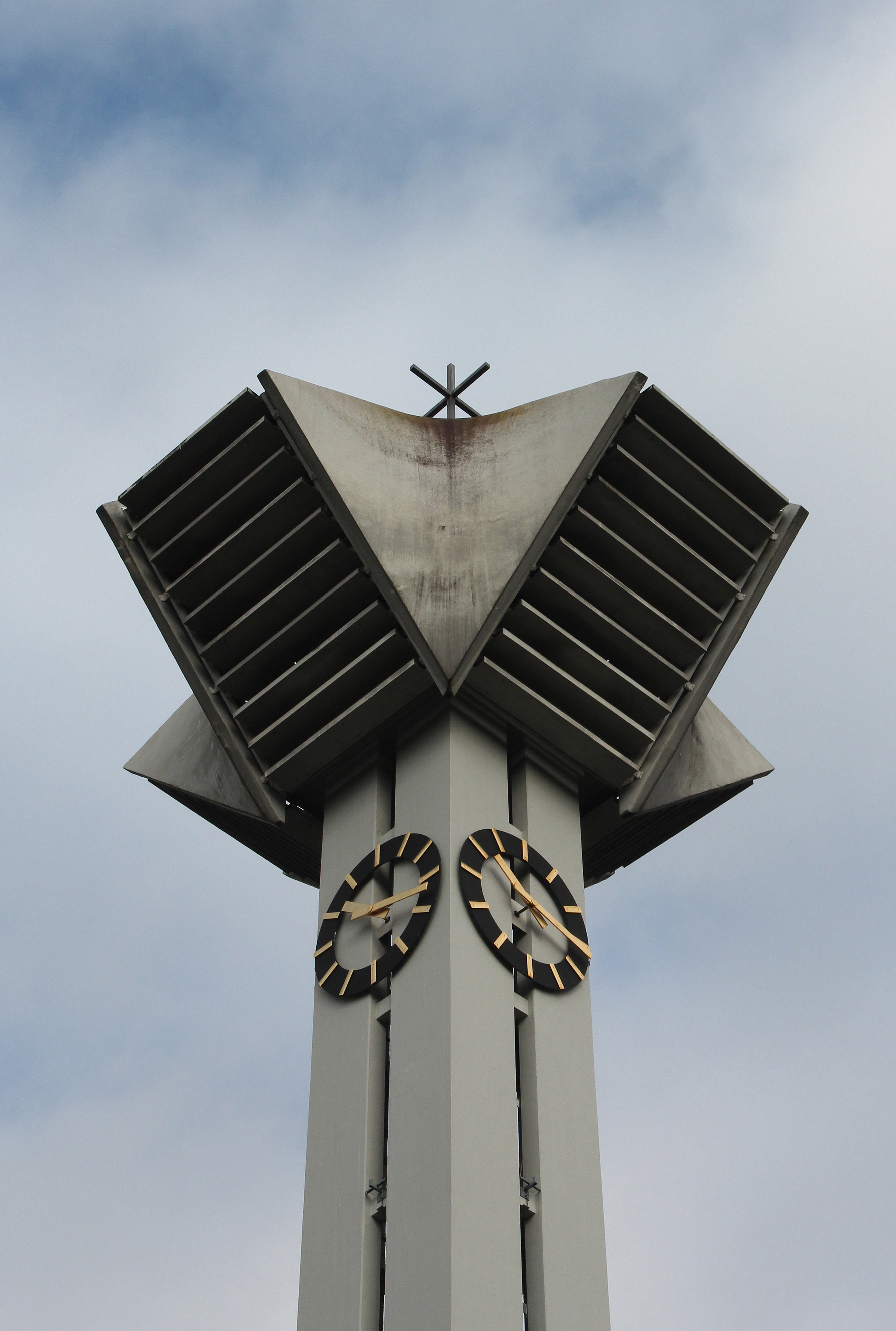 Römisch-katholische Pfarrkirche St. Andreas Uster, Glockenstube